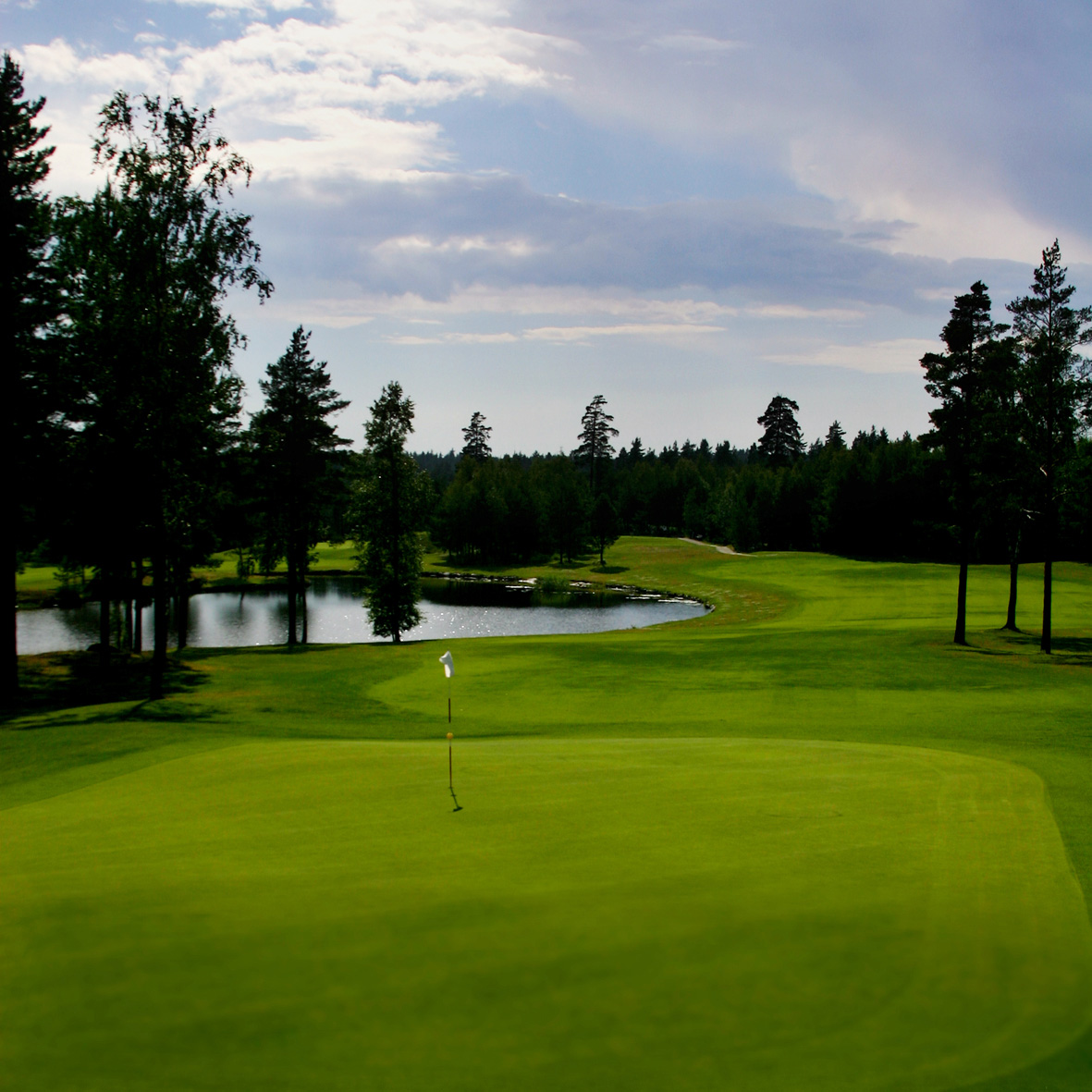 Kuva Benzin väylästä nro 16.